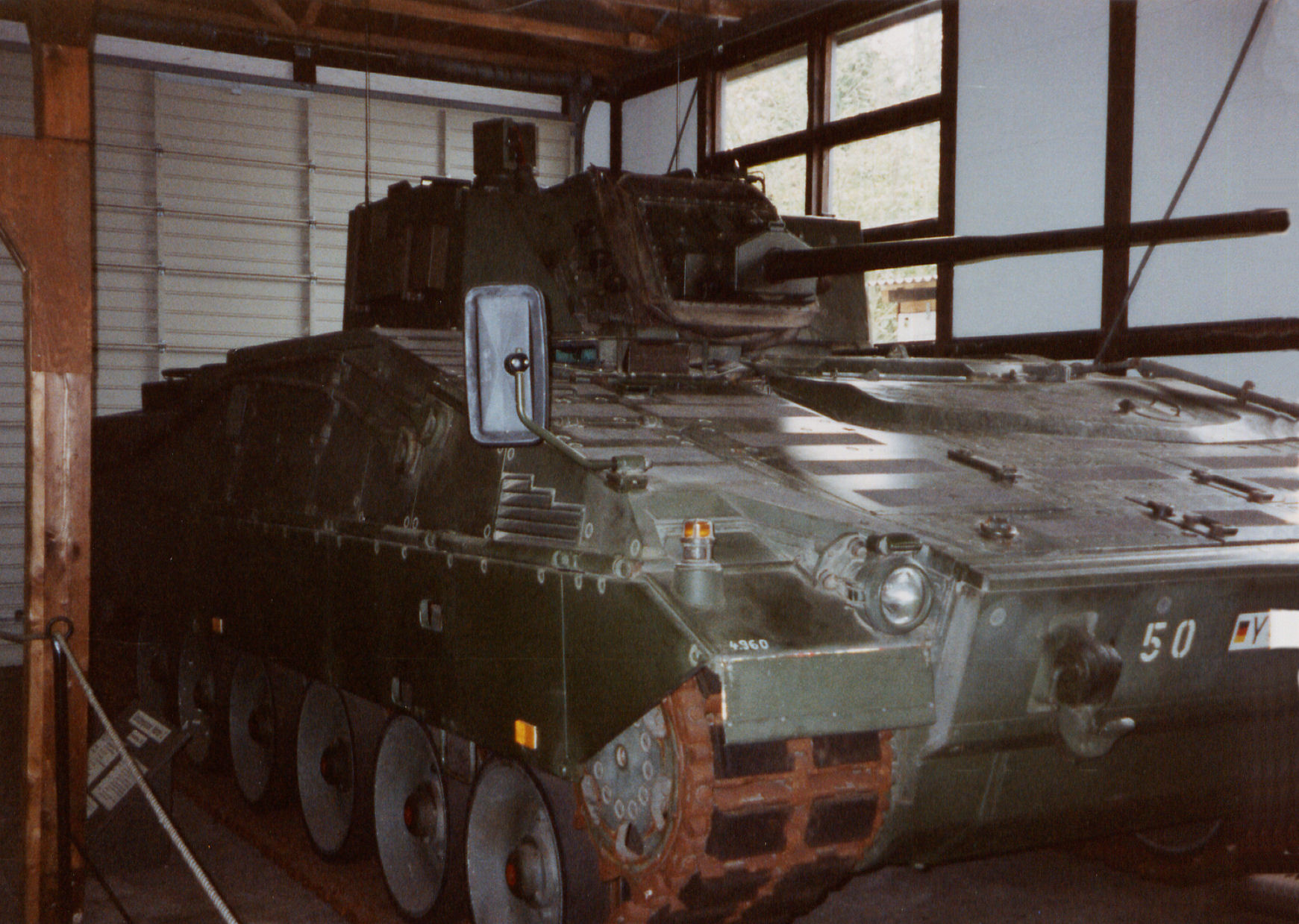 Prototyp des Marder 2